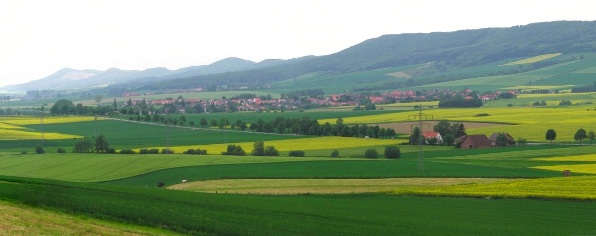 Blick auf Dielmissen, Landkreis Holzminden, Deutschland. Standort: Wiese bei Oelkassen.